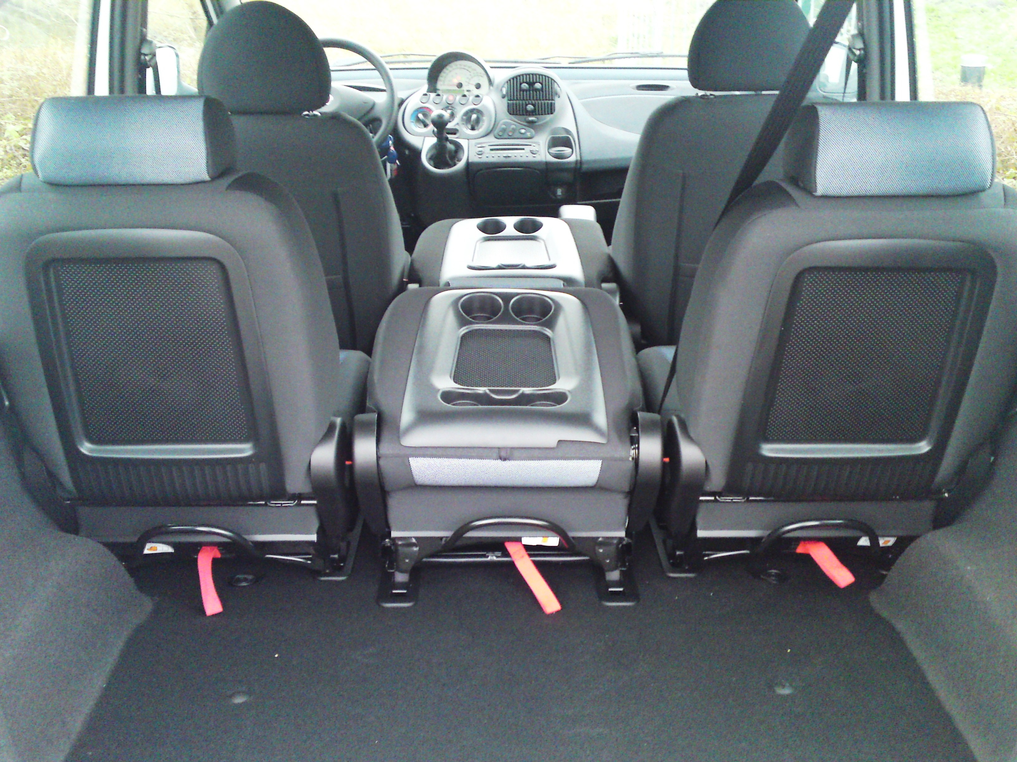 Foto Fiat Multipla inside